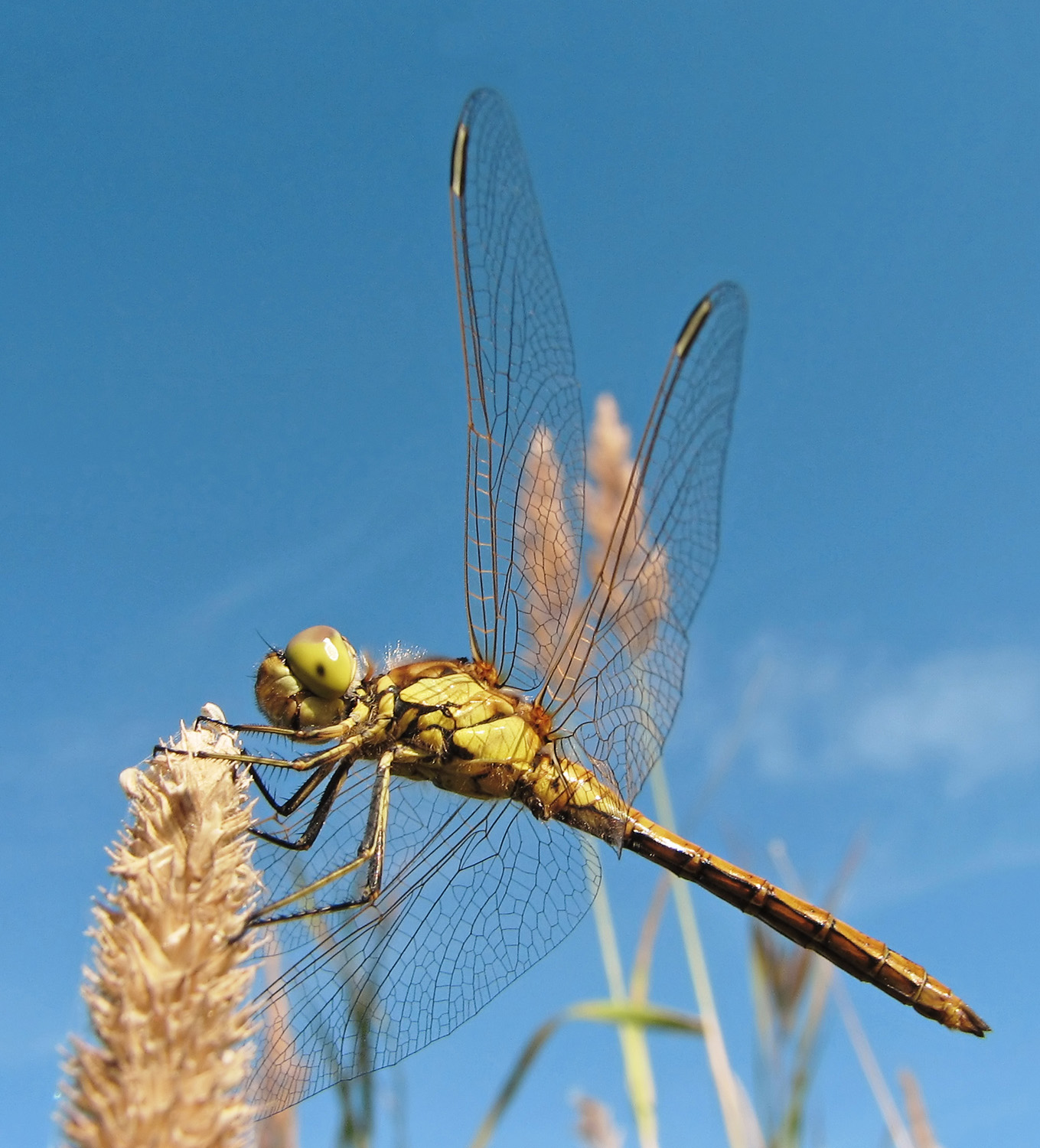 Gemeine Heidelibelle